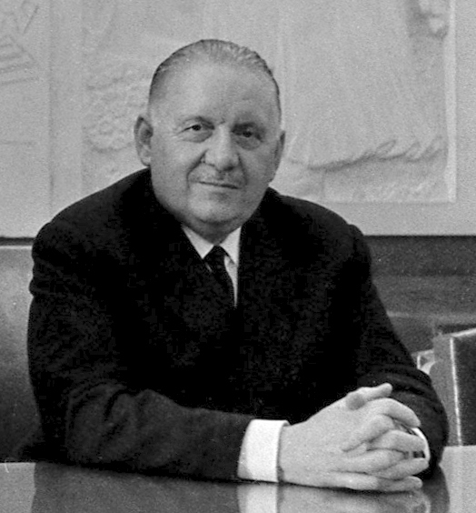 Pas de lieu. Le 23 Avril 1969. Vue de messieurs Poher, Monnerville et Eeckhoutte donnant une conférence de presse.